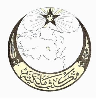 Mekteb-i Mülkiye-i Fünun-u Şahane